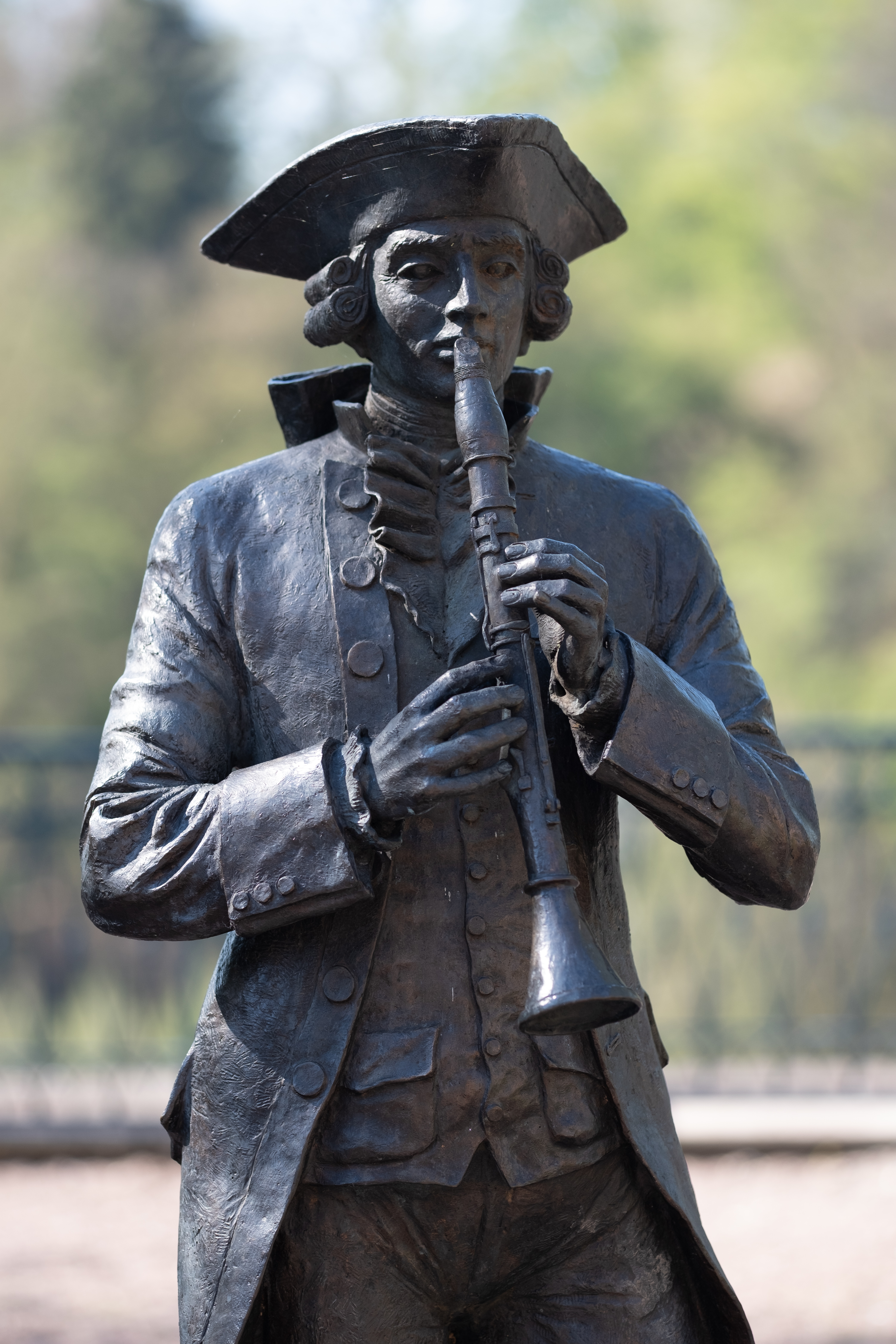 Weilburger Stadtpfeifer